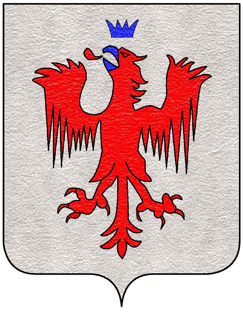 Stemma della famiglia Sauli